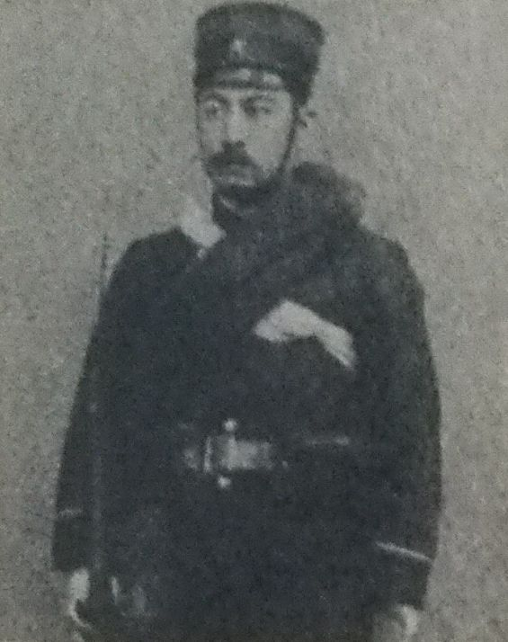 『露営の夢』での七代目松本幸四郎